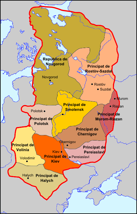 Fragmentacion dau Rus' de Kiev durant lo periòde 1054-1132.